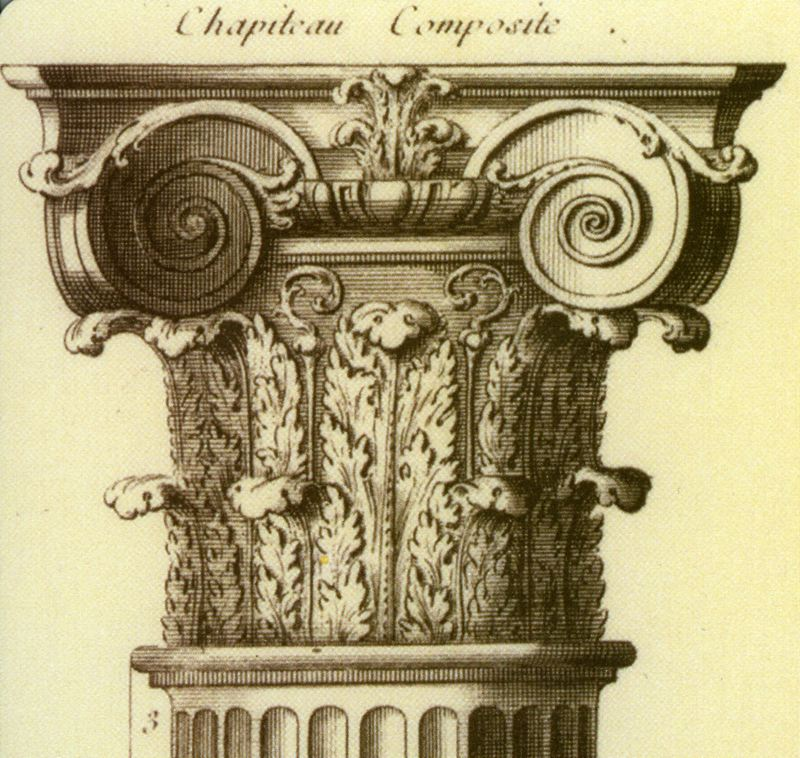 Kompositt Kapitel